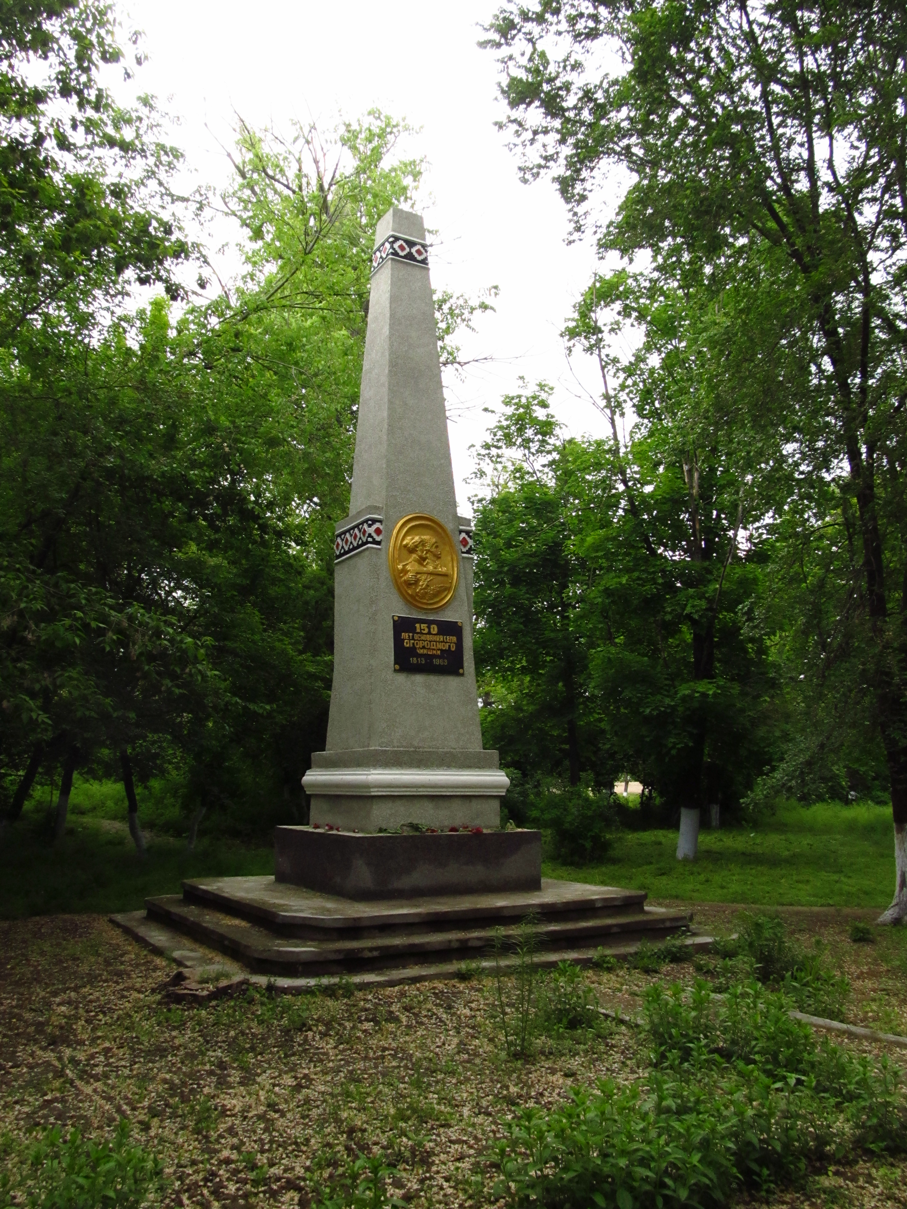 Пам'ятник на честь 150-річчя заснування села, Городнє, в парку біля правління колгоспу